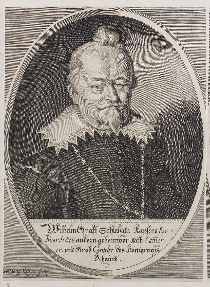 Grafik aus dem Klebeband Nr. 2 der Fürstlich Waldeckschen Hofbibliothek Arolsen Motiv: Wilhelm Slavata von Chlum und Koschumberg, Oberstkanzler von Böhmen, Opfer des Prager Fenstersturzes von 1618